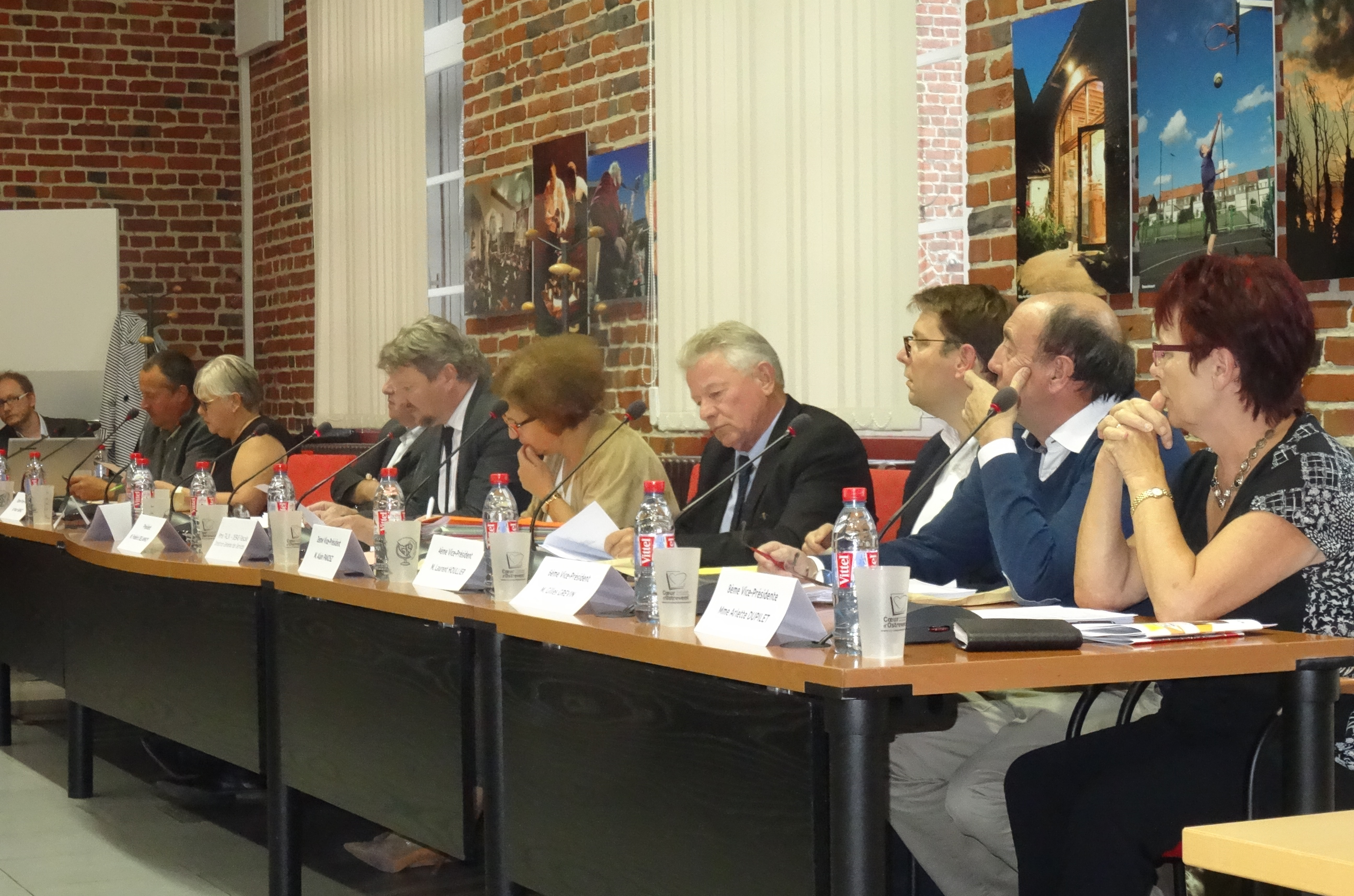 Depicted place: Lewarde Depicted people: Dany Hallant, Frédéric Delannoy, Alain Pakosz, Laurent Houllier, Gilles Grévin and Arlette Dupilet